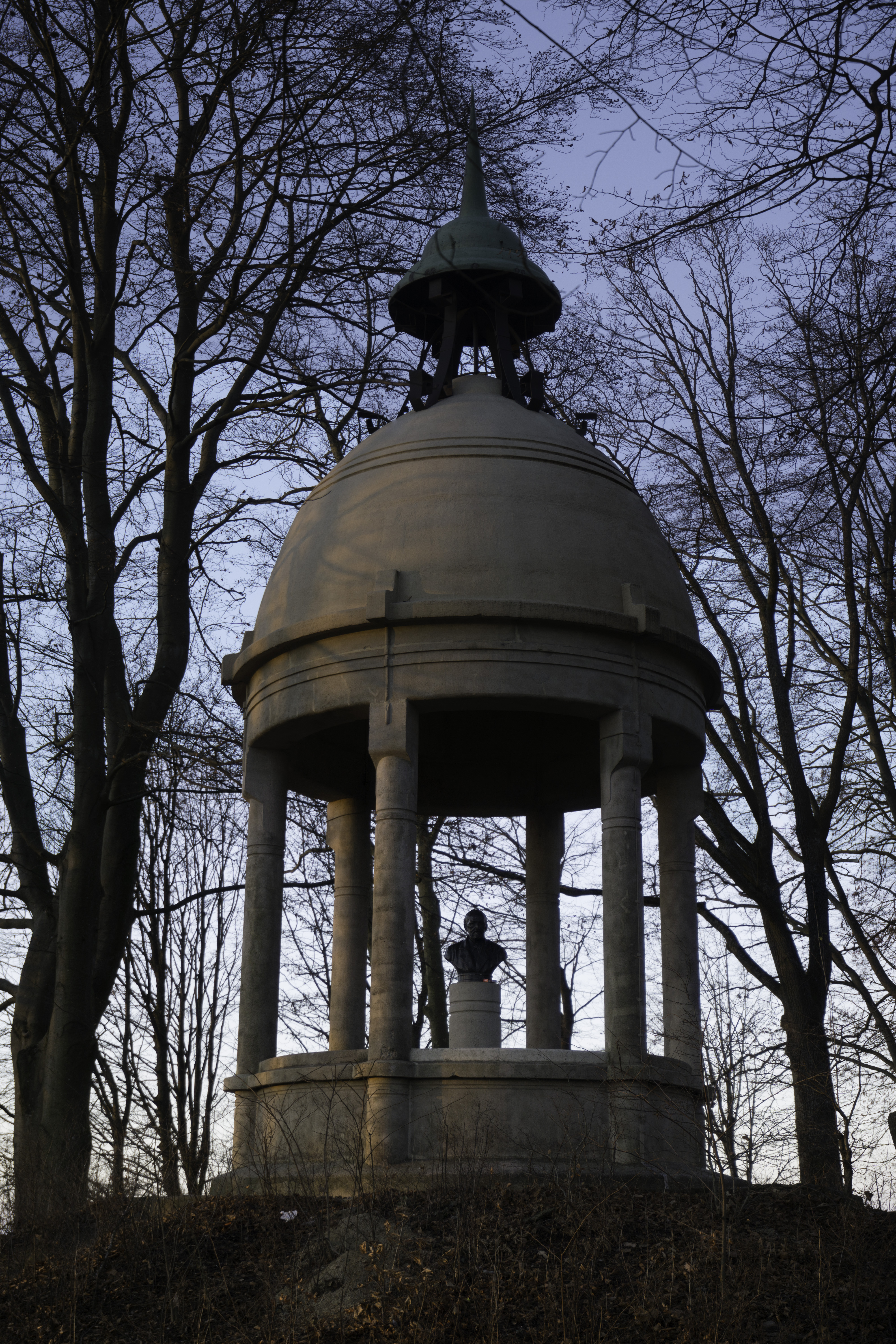 Das Schubertdenkmal auf dem Schutterlindenberg in Lahr.